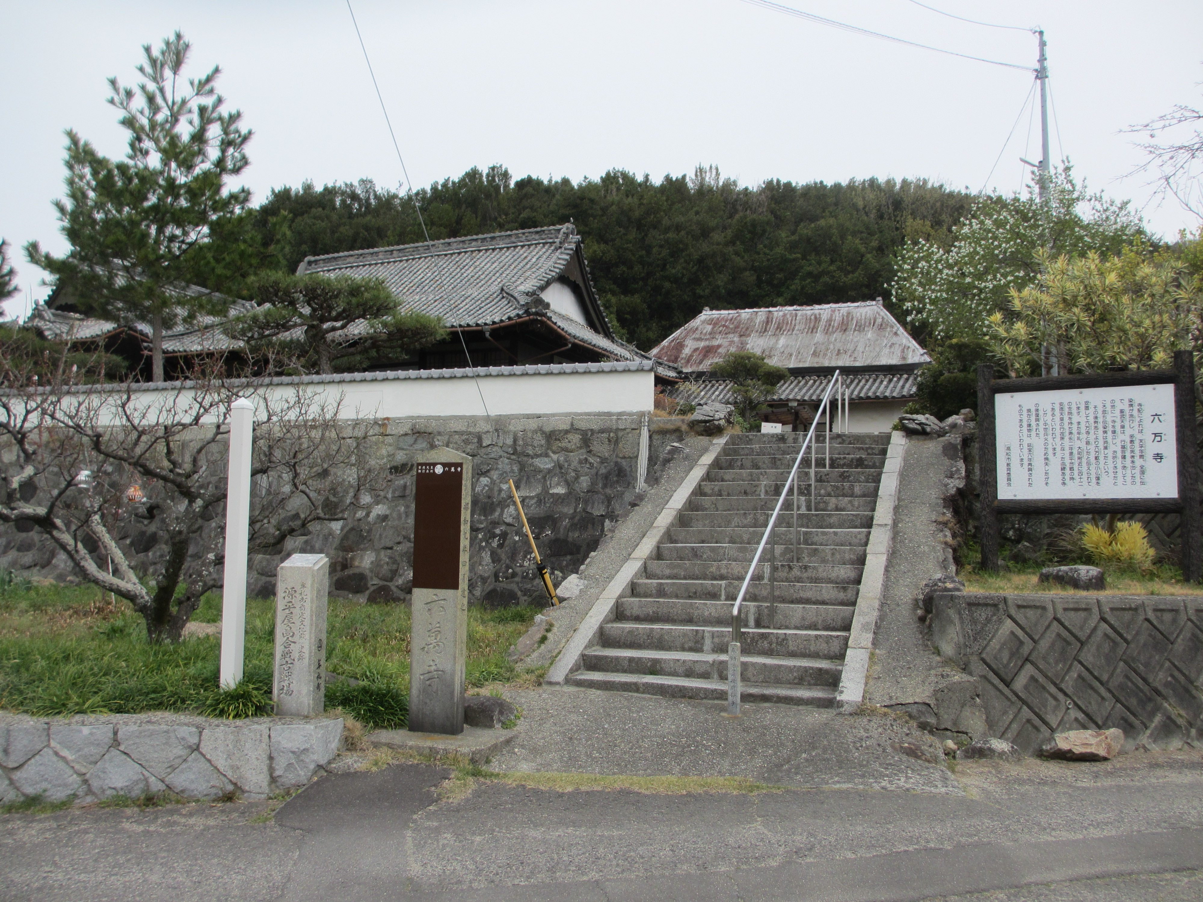 高松市牟礼町牟礼1450最寄JR八栗口駅